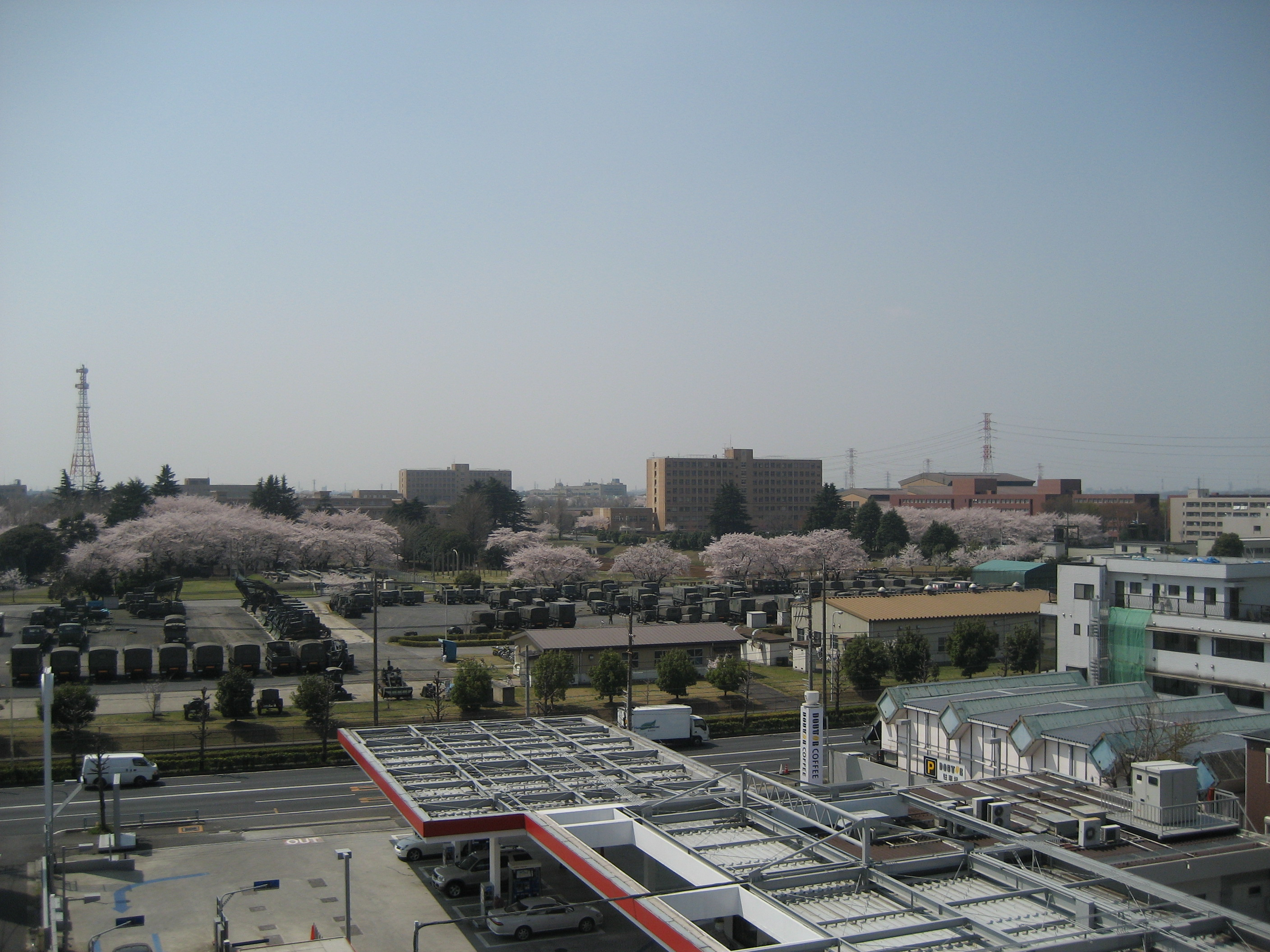 朝霞駐屯地全景２